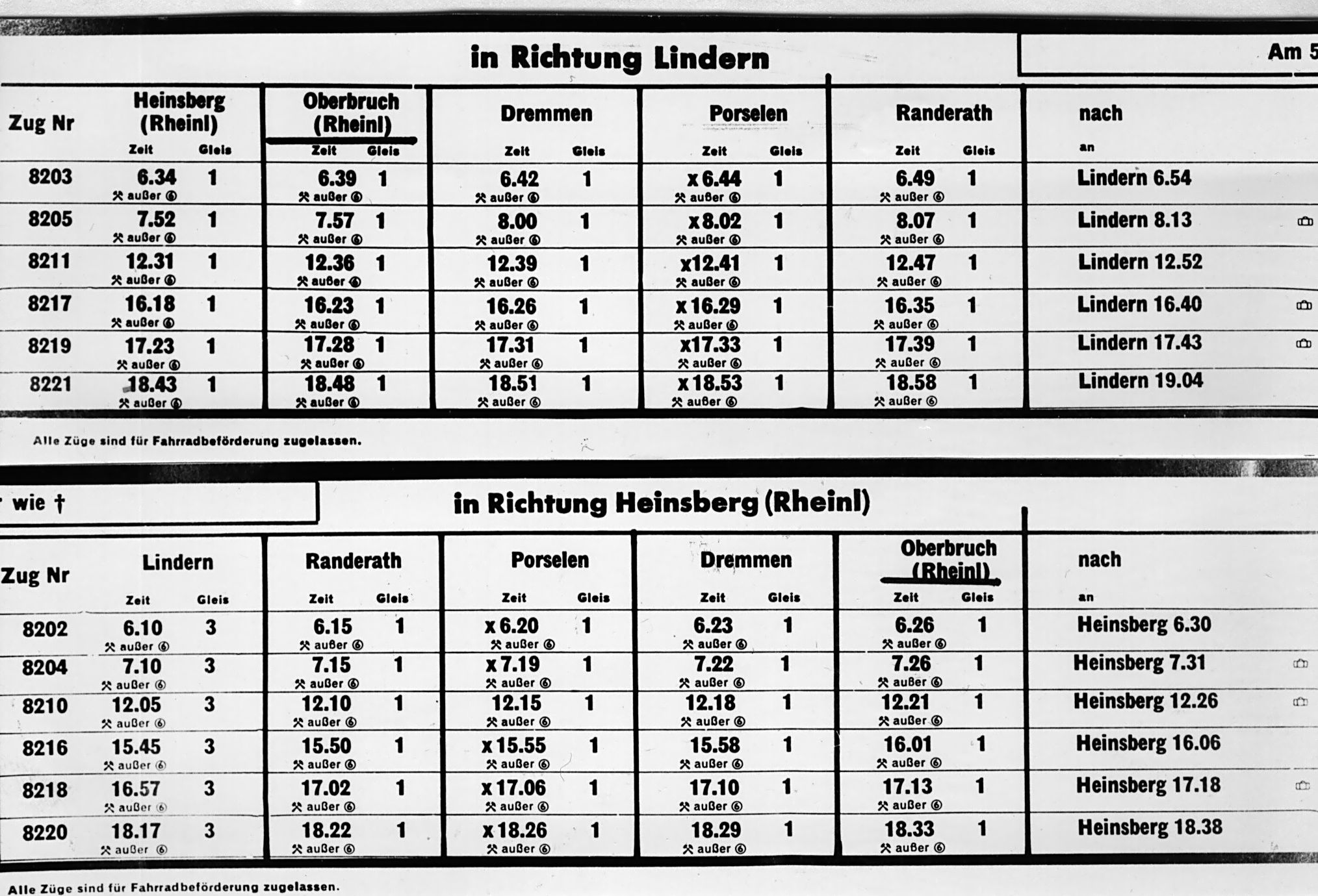 Letzter_Fahrplan_Heinsberg